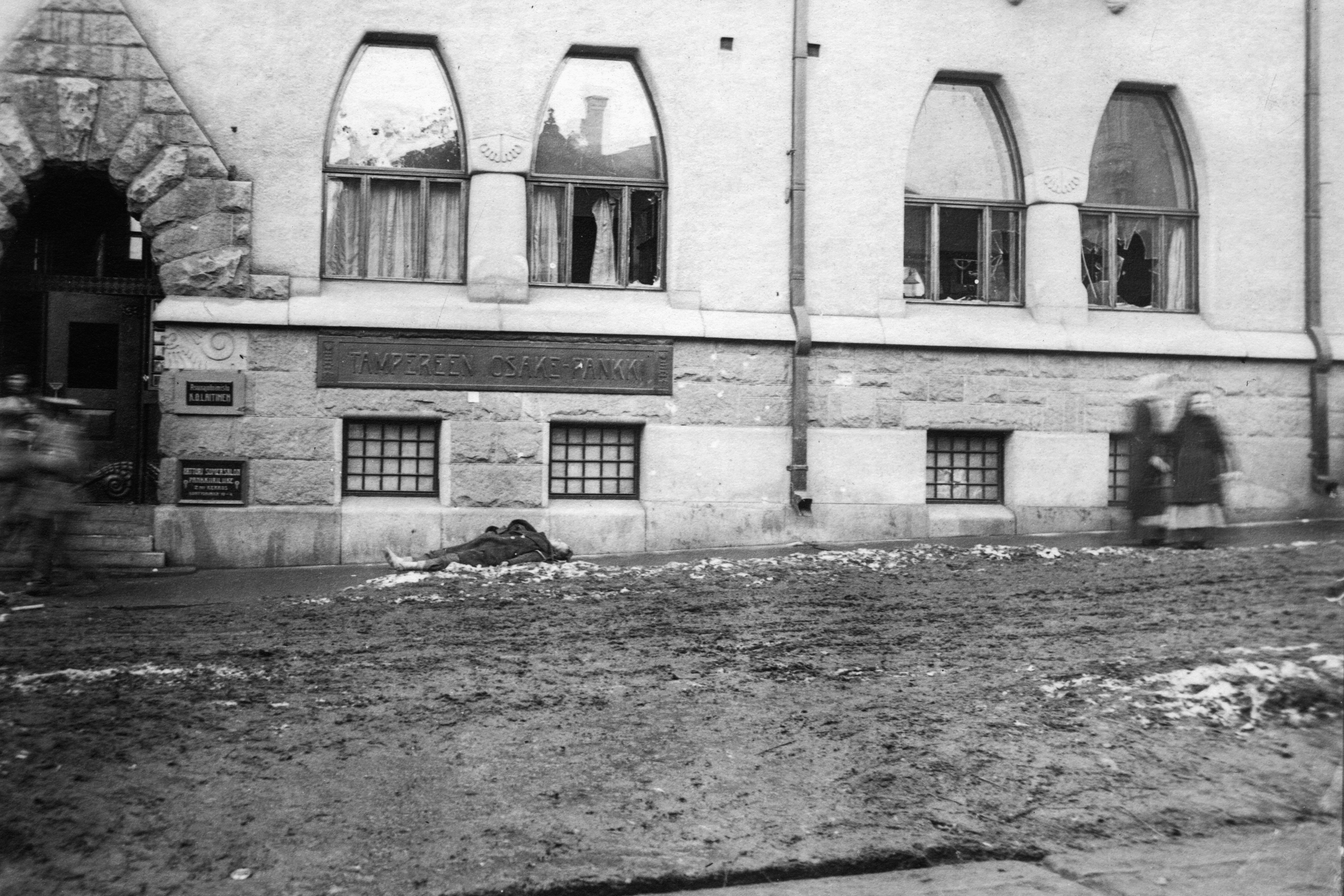 Kuollut punakaartilainen Kauppakatu 7:n edessä. CC-BY Tampere 1918, kuvaaja tuntematon, Vapriikin kuva-arkisto. Finnish Civil War 1918, Photographer unknown, Vapriikki Photo Archives.